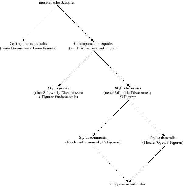 Schematische Darstellung der verschiedenen Satzarten und ihrer Stellung bei Christoph Bernhard